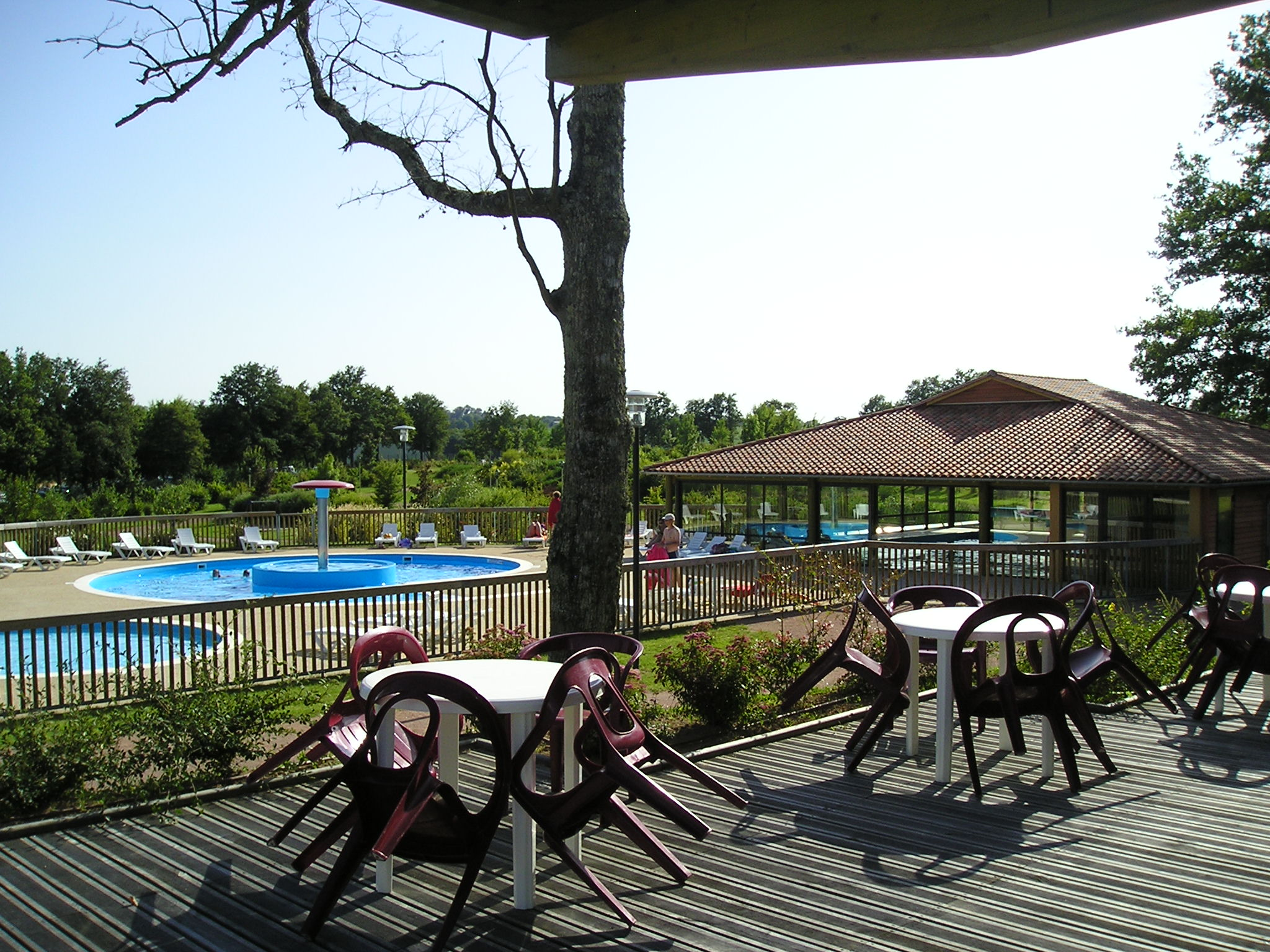 Camping des lacs de Haute-Charente, Pressignac, Charente, France.